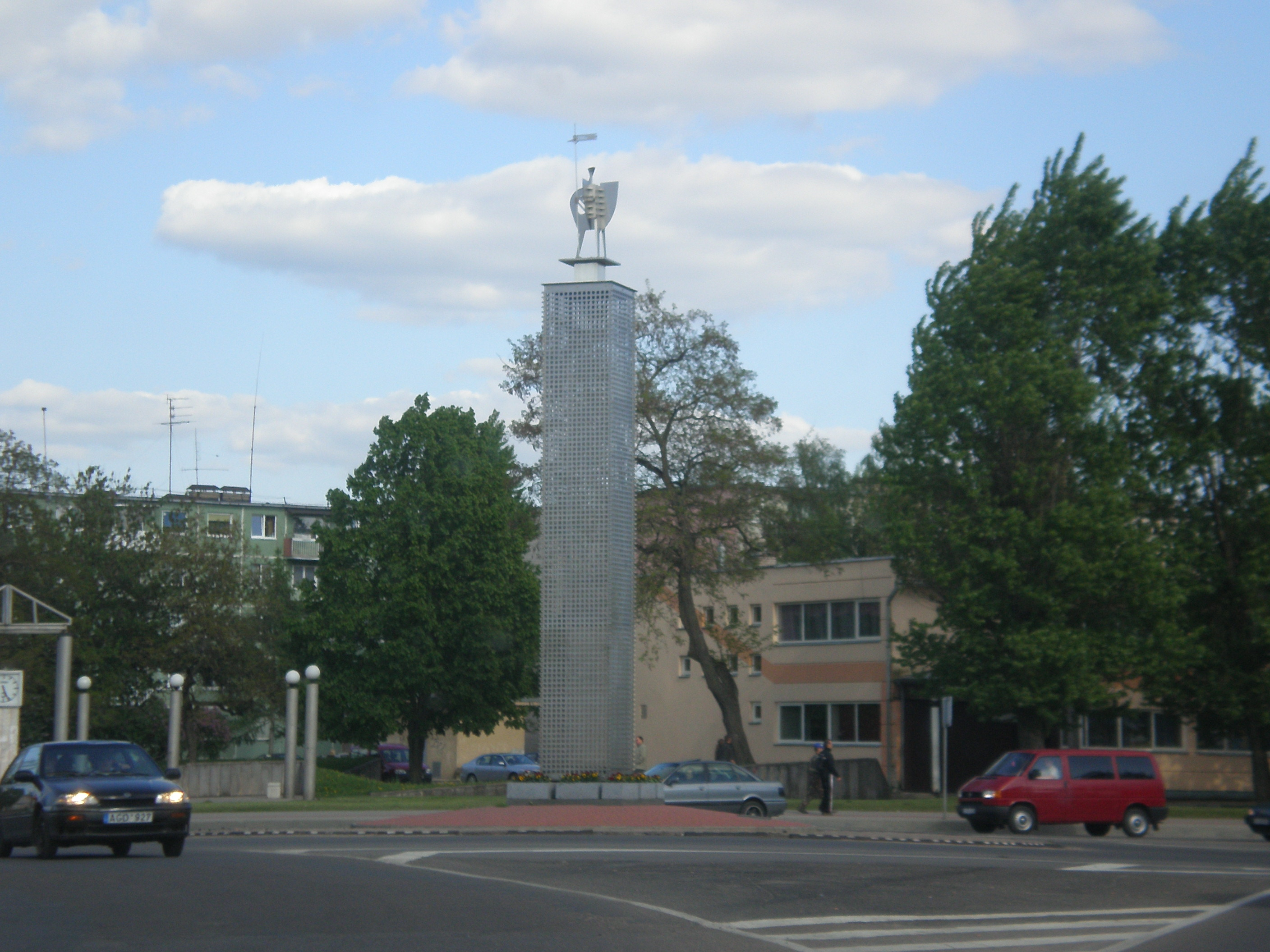 „Šviesos bokštas“ Jonavoje